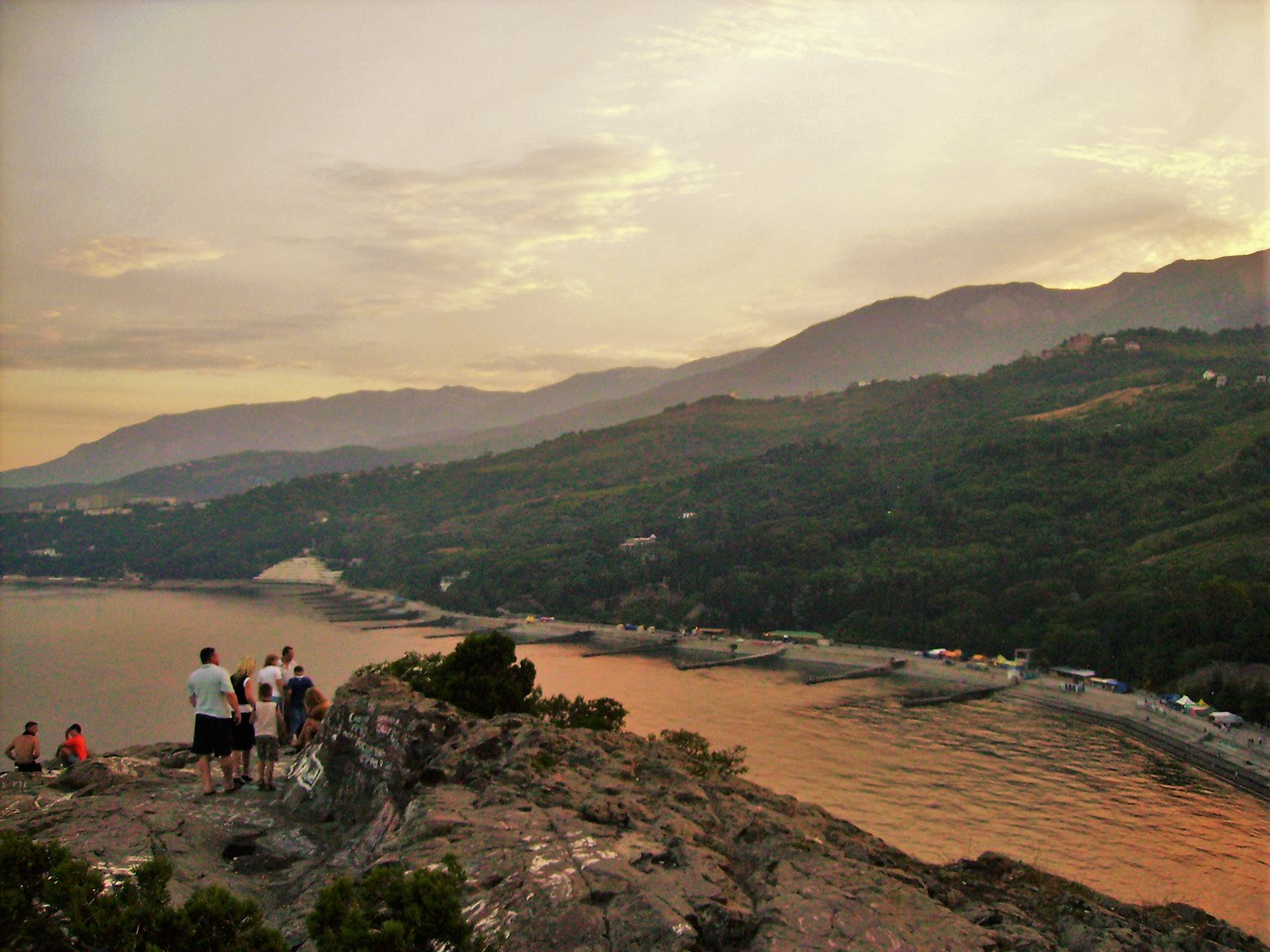 Вид с мыса Плака на набережную поселка Утес.